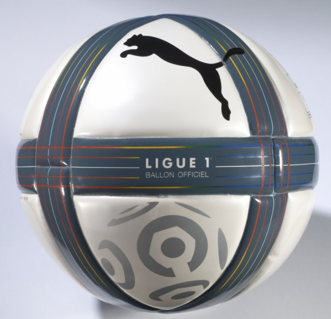 Ballon officiel L1 2010-2011